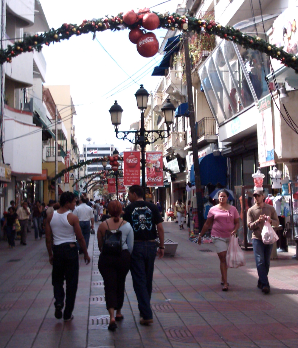 Die Einkaufsstraße Calle El Conde in der Vorweihnachtszeit